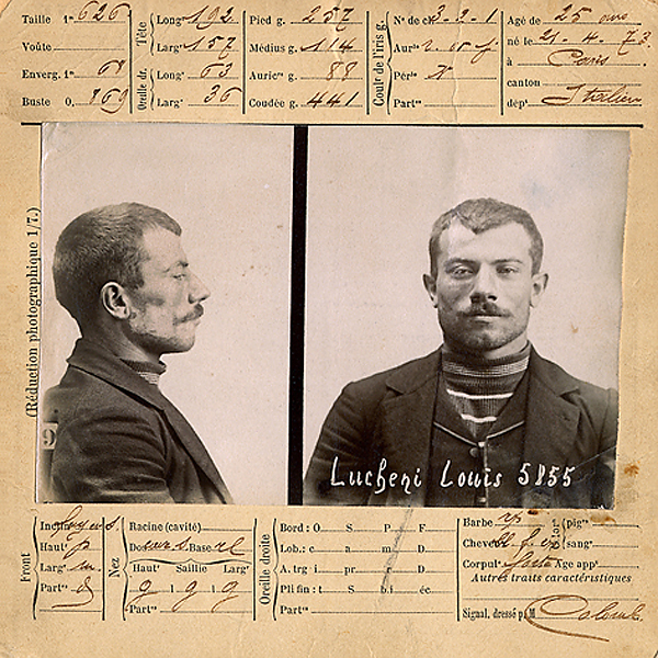 Ficha de Polícia de Luigi Lucheni o regicida.